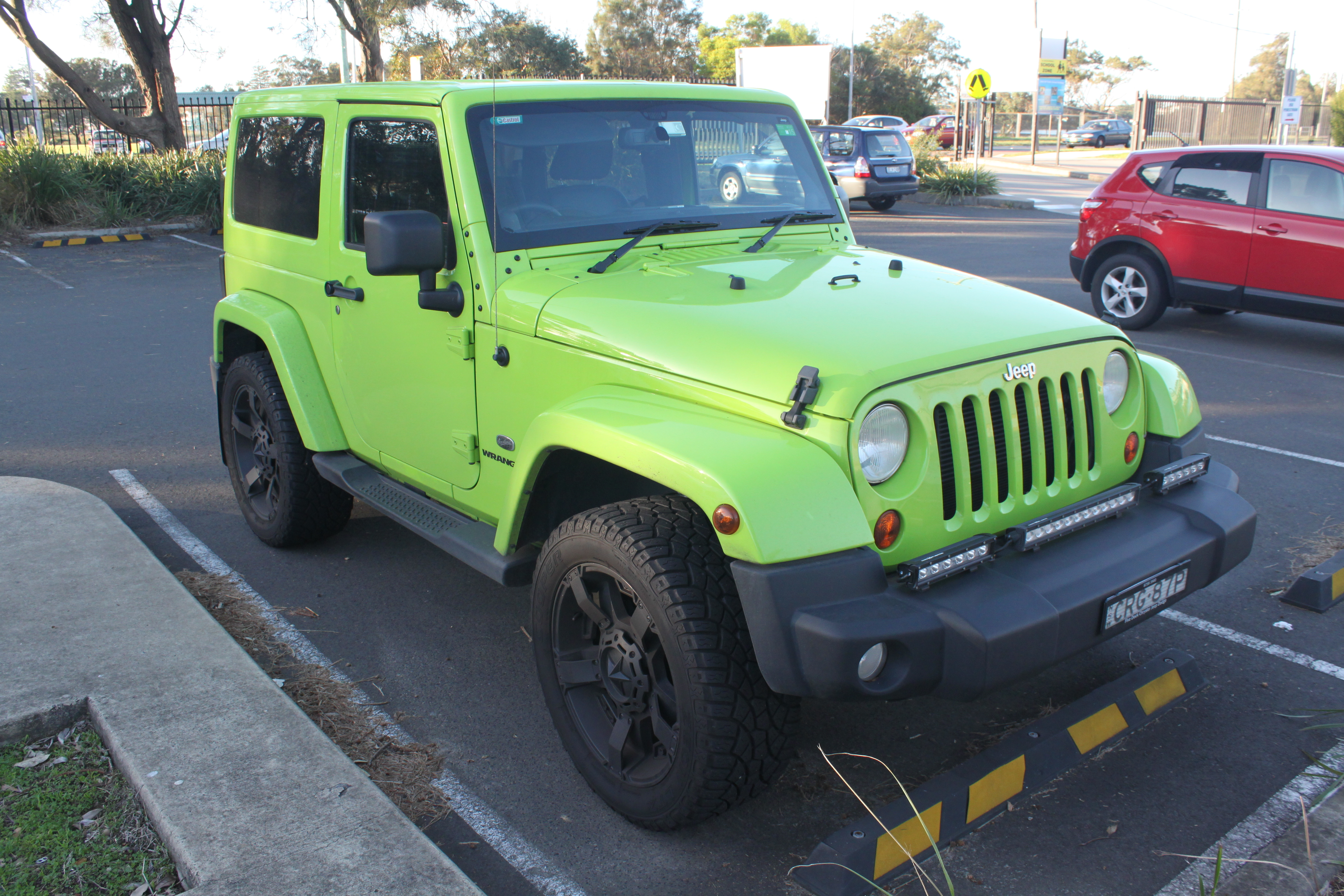 Jeep Wrangler JK